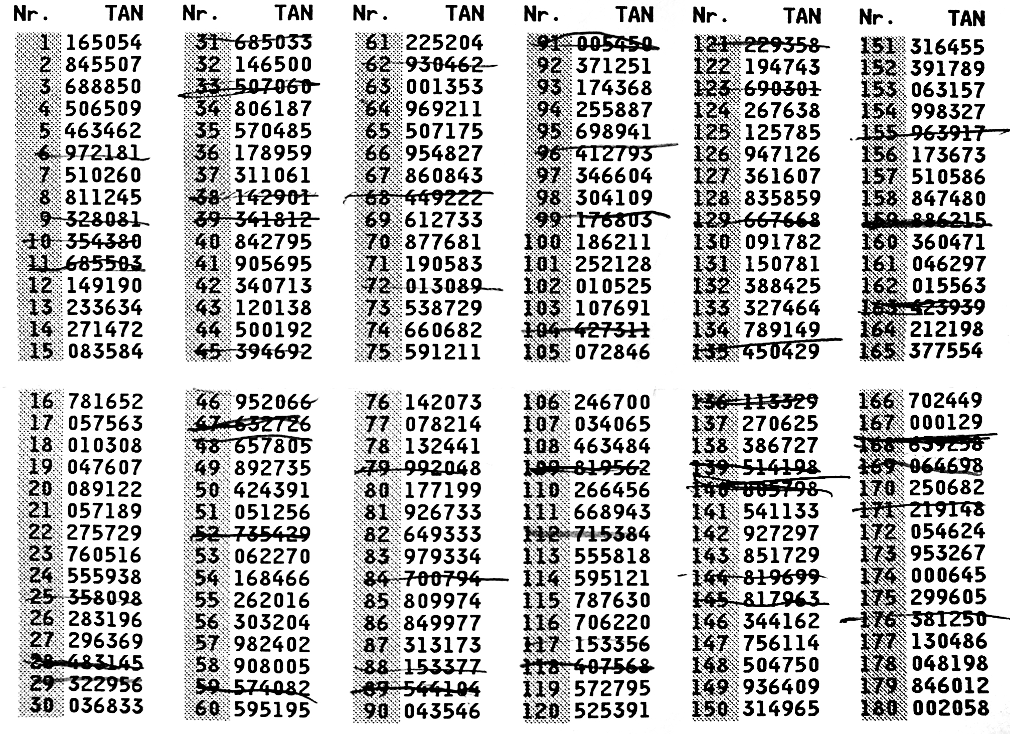 Eine ausgelaufene Tanliste, welche per Post an die Bankkunden verschickt werden. Die bereits benutzen TANs sollten aus Gründen der Sicherheit nicht gestrichen werden. (In diesem Fall dient das aber einem enzyklopädischem Zweck)